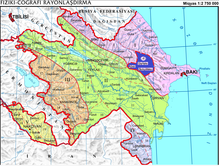 Şamaxı fiziki-coğrafi rayonu